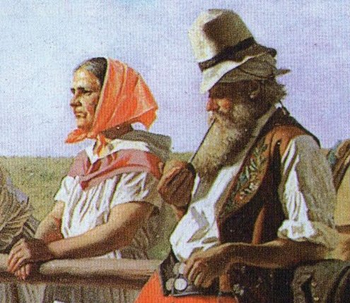 Detalhe da Tela de Juan Manuel Blanes titulada Los Tres Chiripás. 1881 - Óleo sobre tela